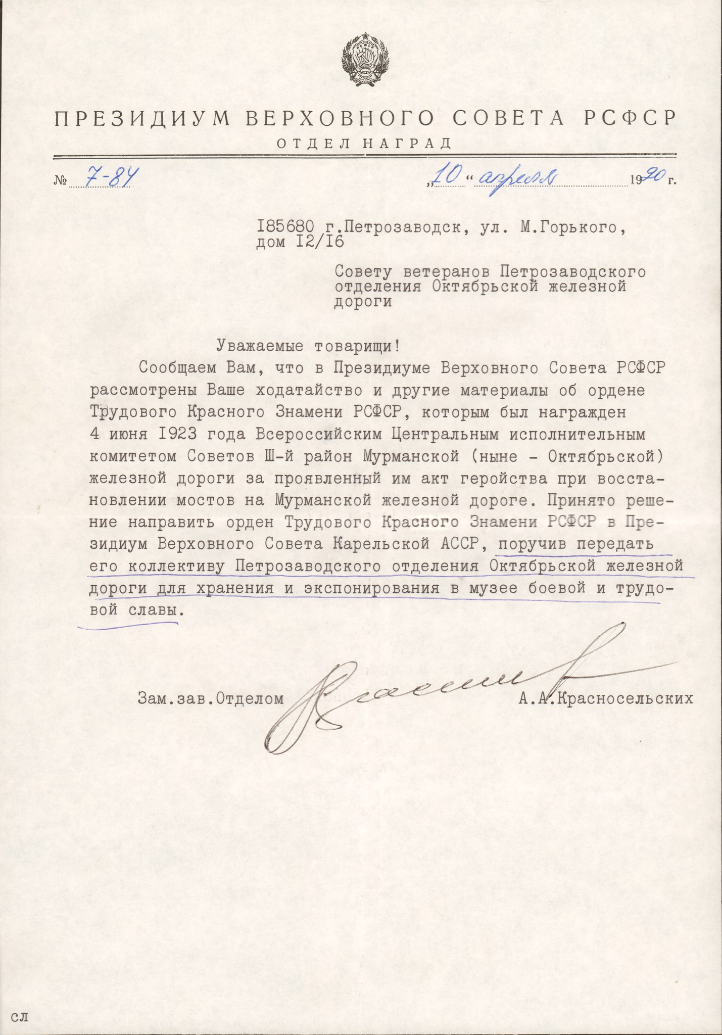 Решение Президиума Верховного Совета РСФСР о возвращении и передаче коллективу Петрозаводского отделения Октябрьской железной дороги Ордена Трудового Красного Знамени РСФСР. (письмо №7-84 от 10 апреля 1990 г.)